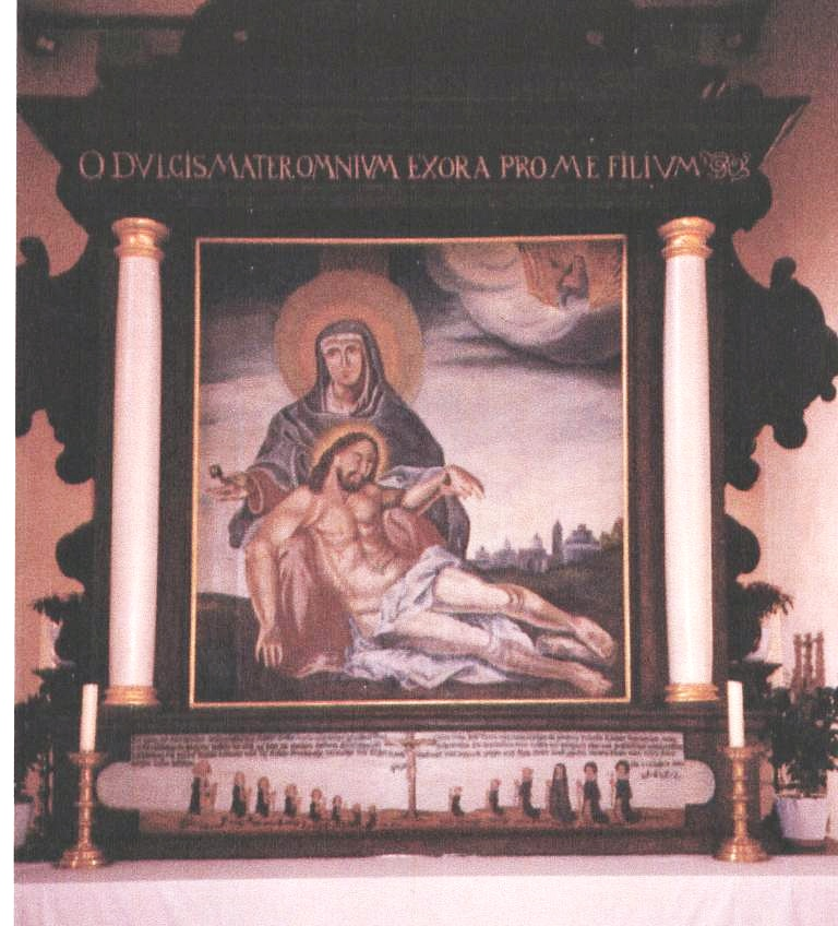 Hochaltar Kloster Frauenroth, Rückseite. Darstellung des Stifters Maximilian Adam Ludwig von Blumencron mit seiner Familie, 1652